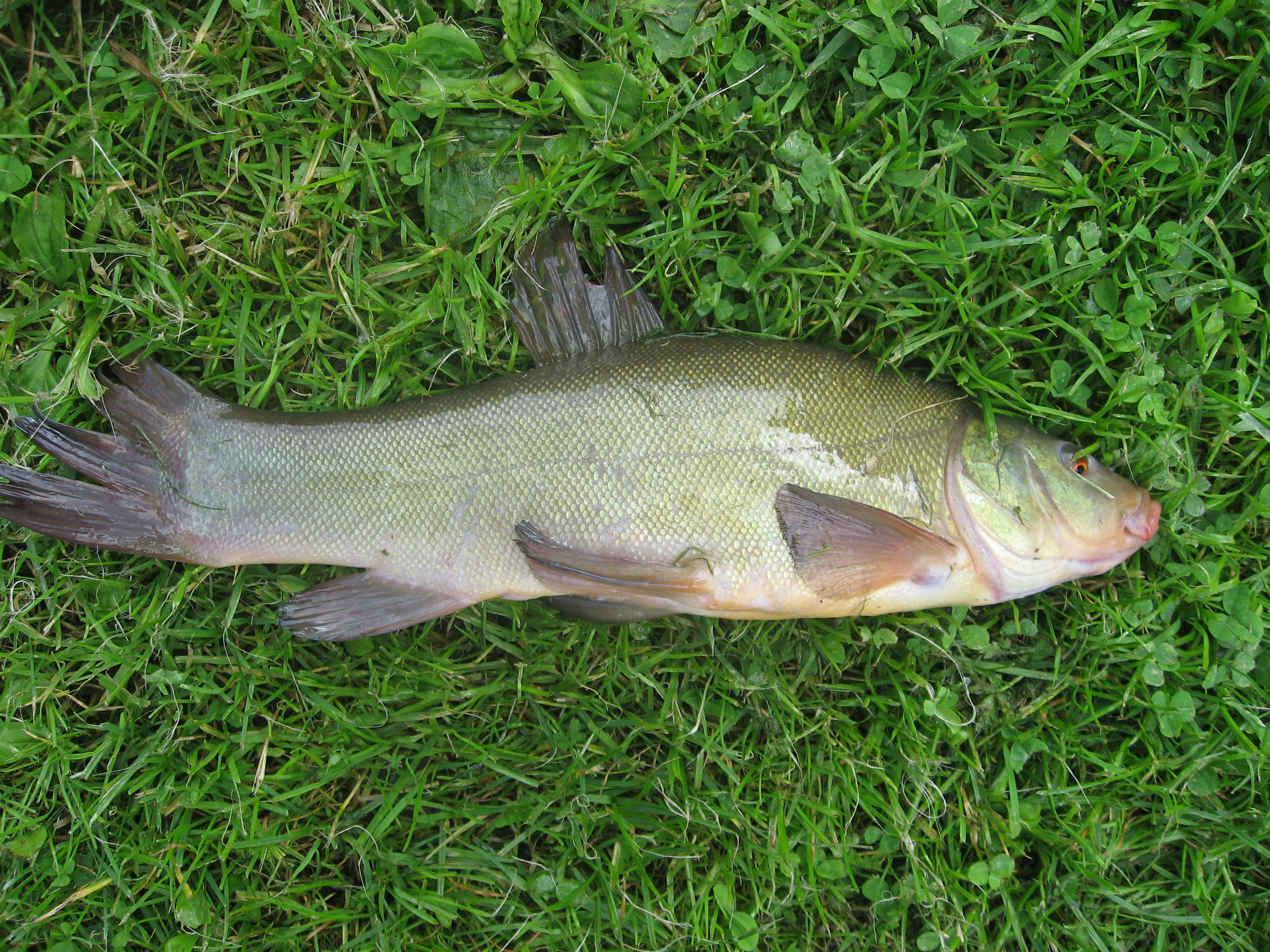 Lín obecný